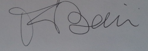 FirmaBaccini